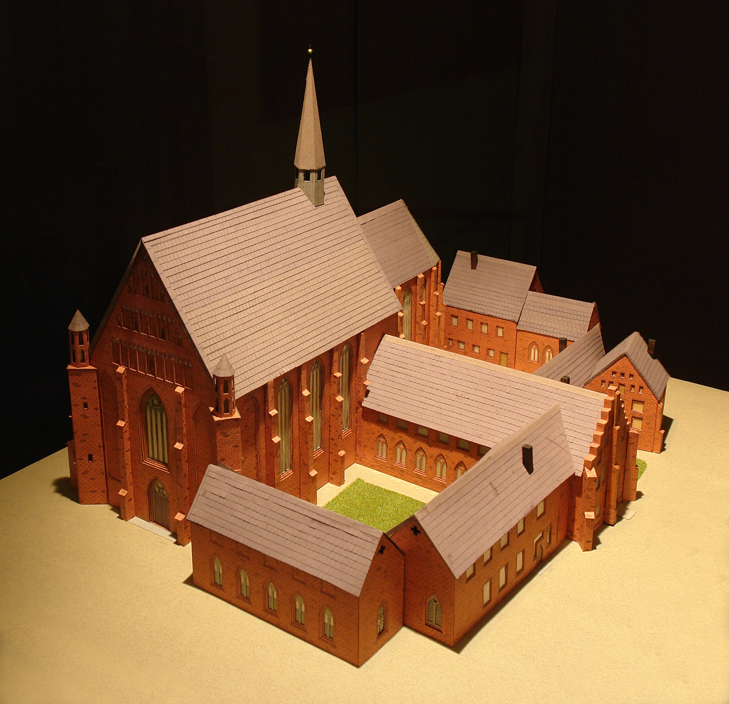 Modell im Bremer Dom-Museum: St. Johannis und die Klostergebäude vor deren Abbruch